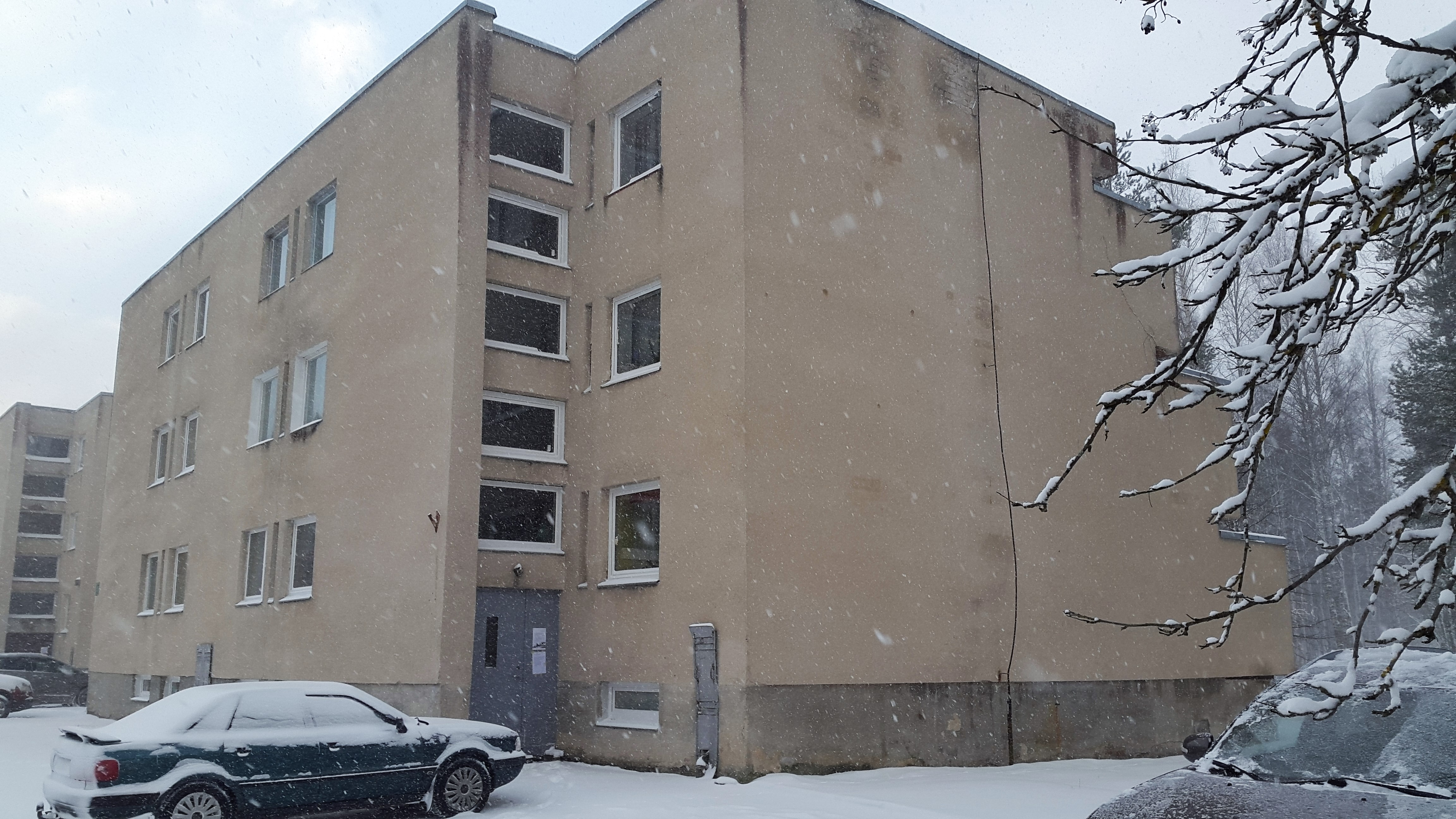 Talvine pilt Padise keskuses asuvast Koidula kolhoosi terrasselamust.